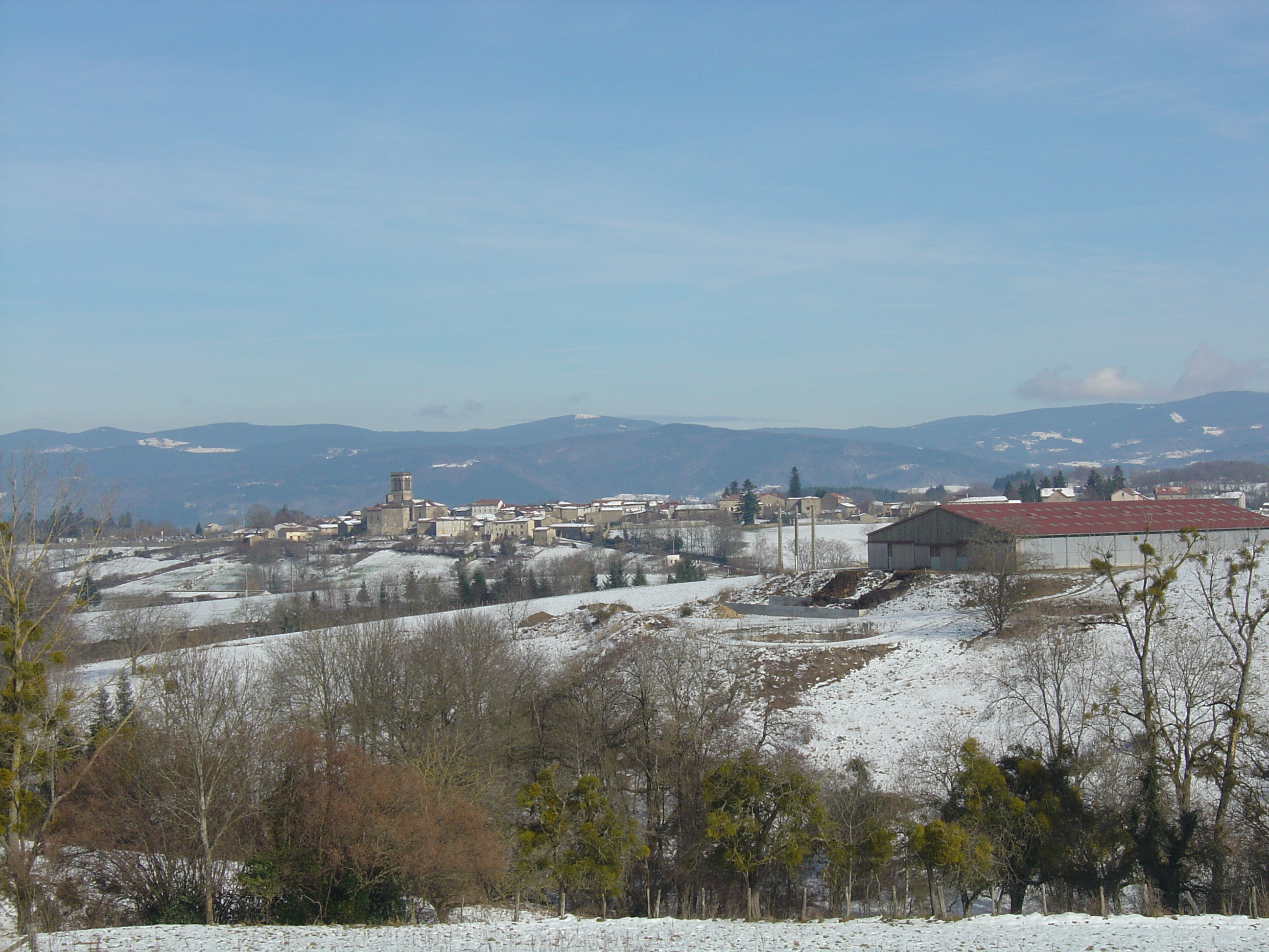 Vue générale de Tours-sur-Meymont